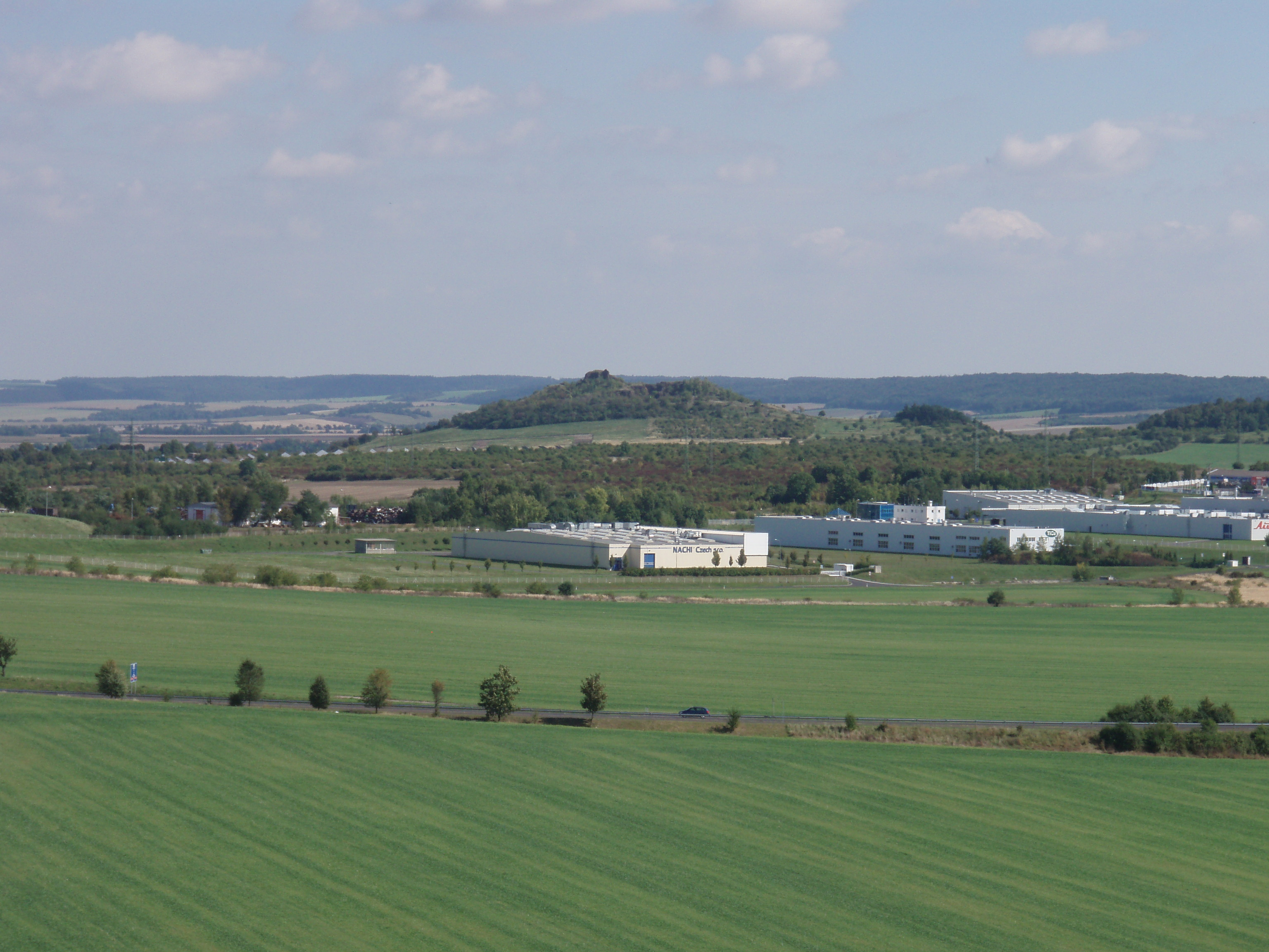 Pohled z vodárenské věže na Blšanský chlum. Před ním průmyslová zóna Louny - jihovýchod.